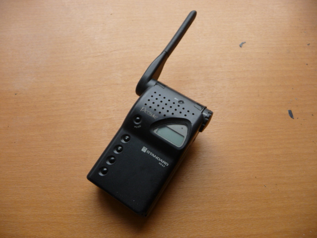 STANDARDブランドの無線機器